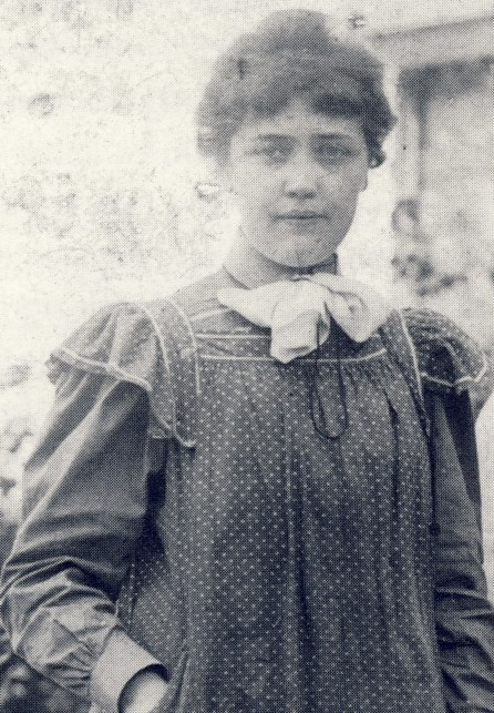 Ruth Milles (1873-1941) syster till Carl Milles